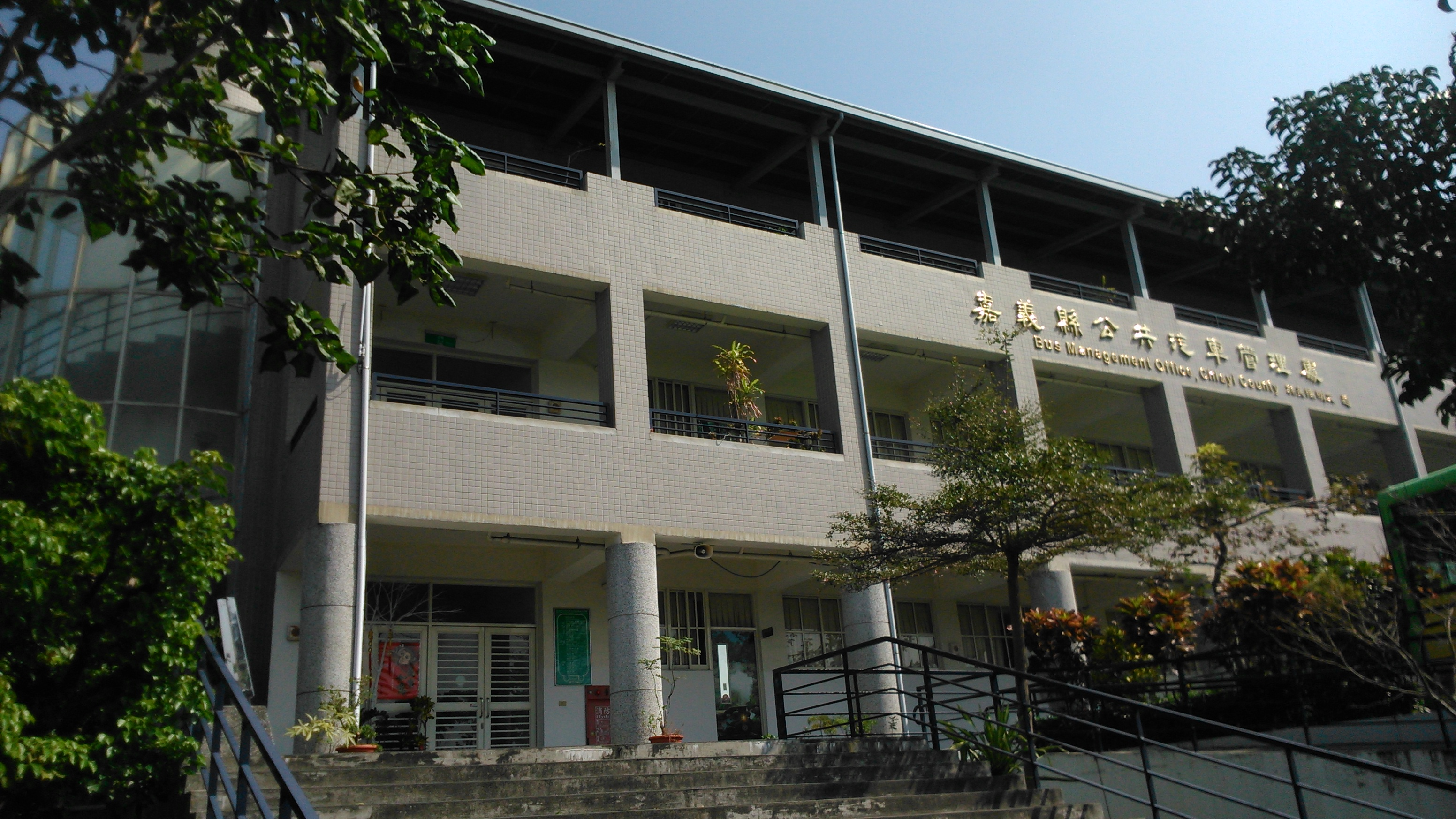 嘉義縣公共汽車管理處，位於嘉義市東區大雅路二段635號。